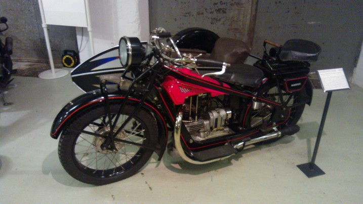 letztes Wanderer Motorrad deren Produktion zu JaWa überging